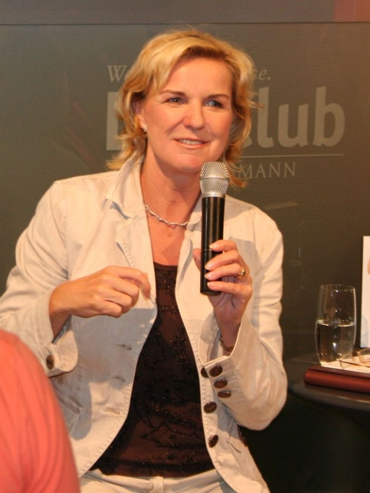 Hera Lind auf der Frankfurter Buchmesse, über ihr Buch "Voll im Leben" sprechend